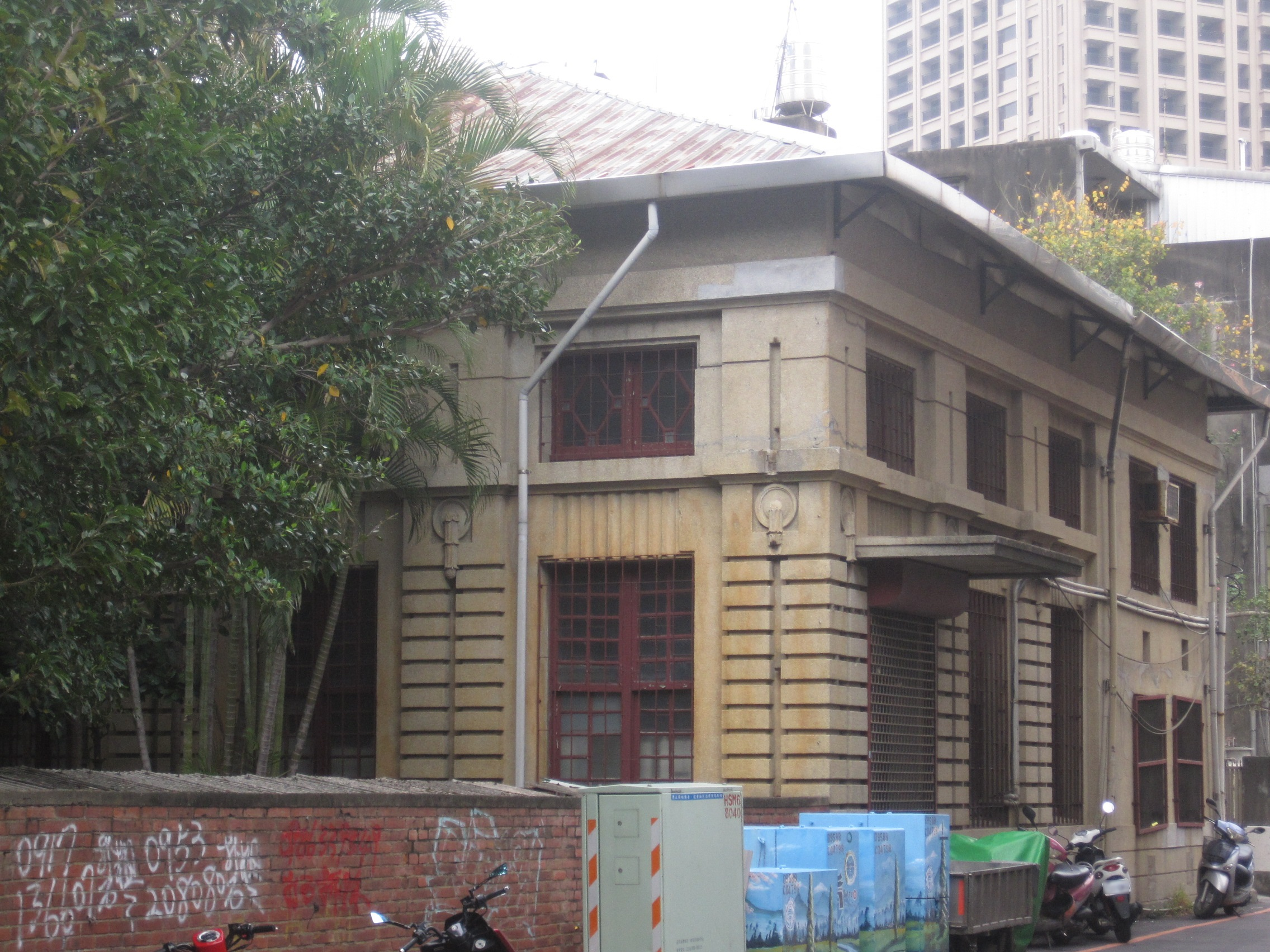 新竹州圖書館側邊